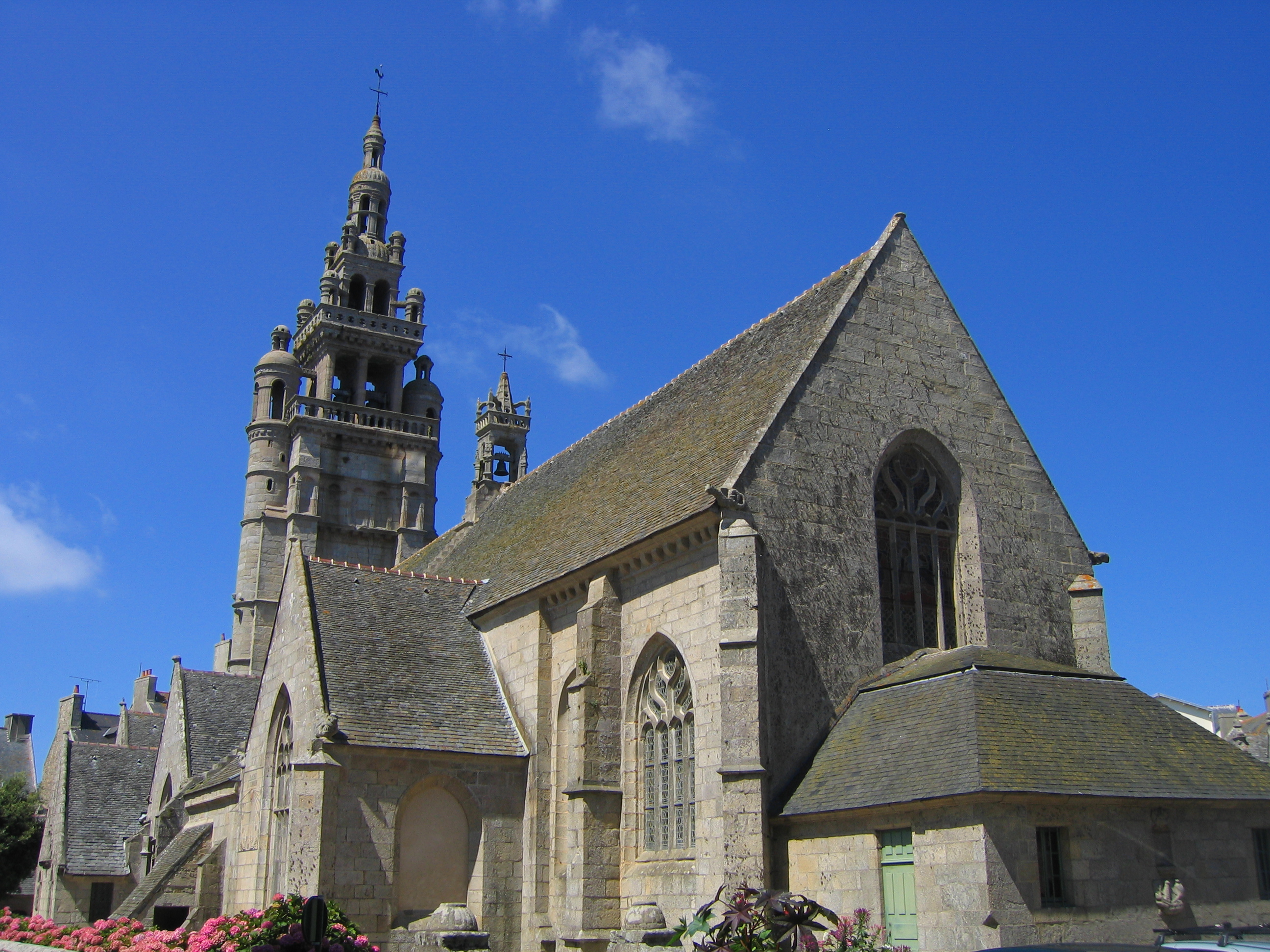 L'église de Notre-Dame de Croaz Batz à Roscoff vue de l'arrière.